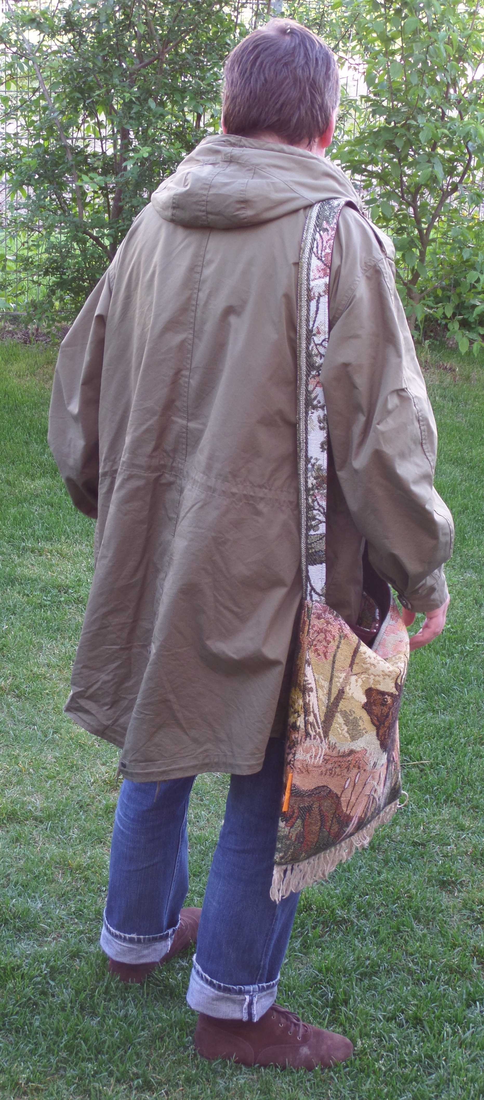 Hirschbeutel